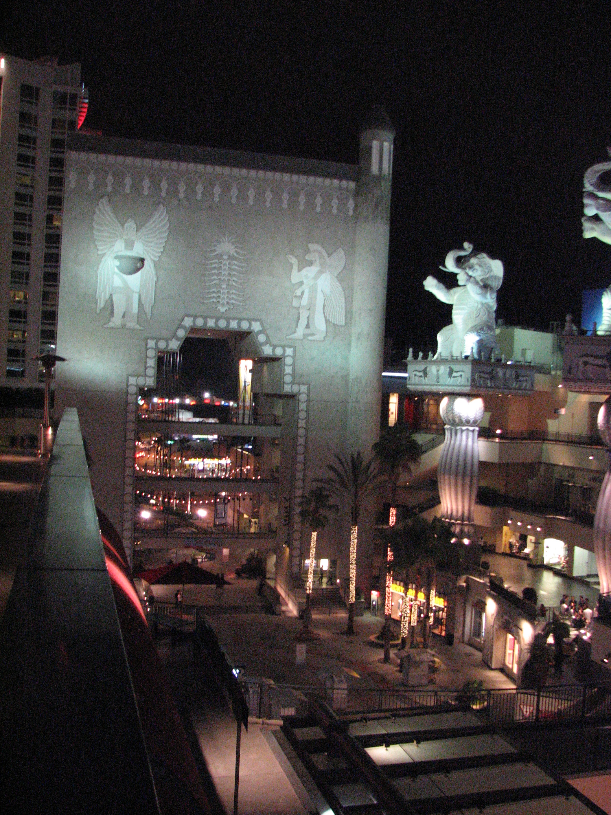 Арката на новия Вавилон (Холивуд, САЩ). 1. Вавилонската арка.